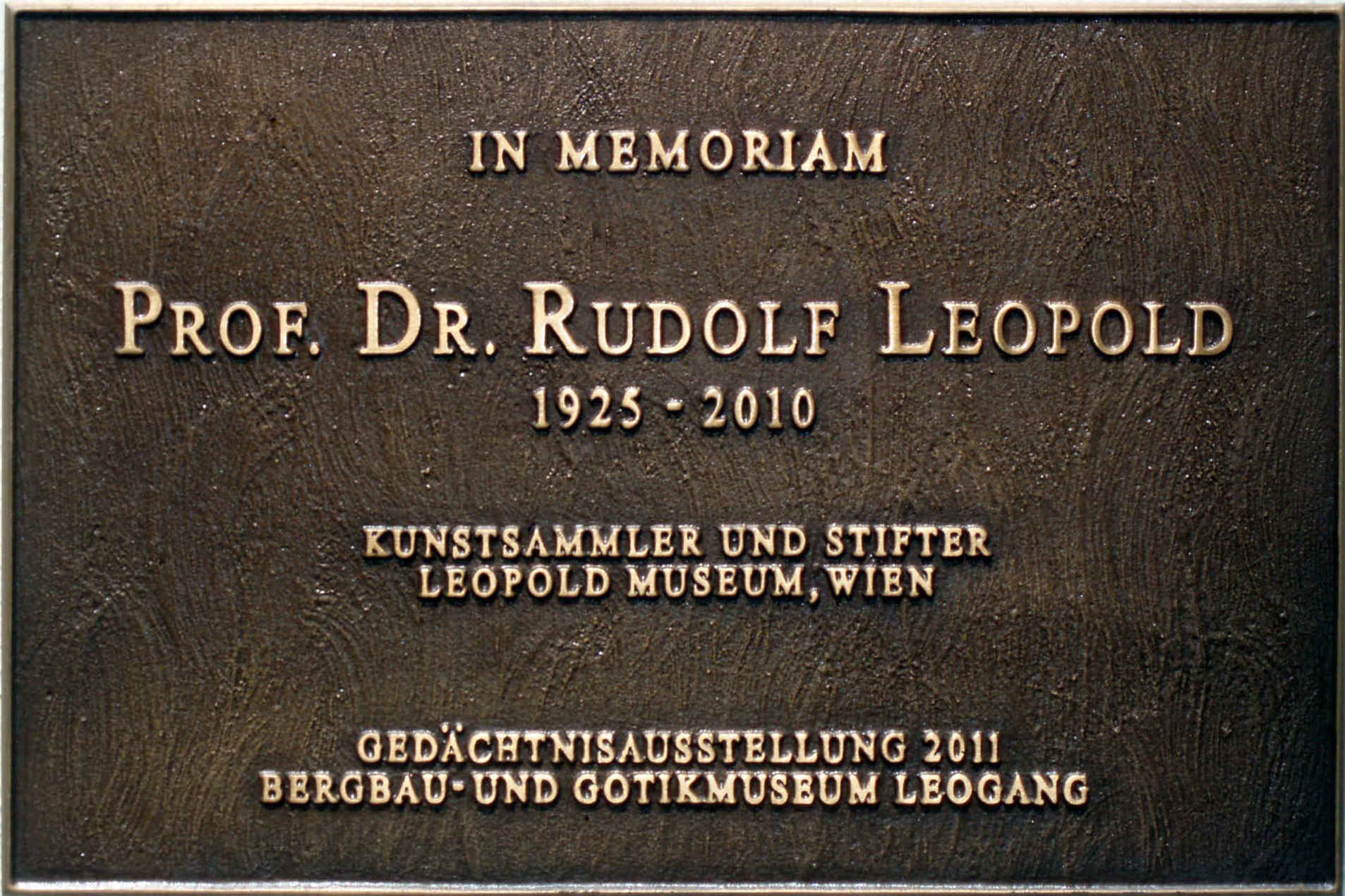 Gedenktafel für Prof. Dr. Rudolf Leopold